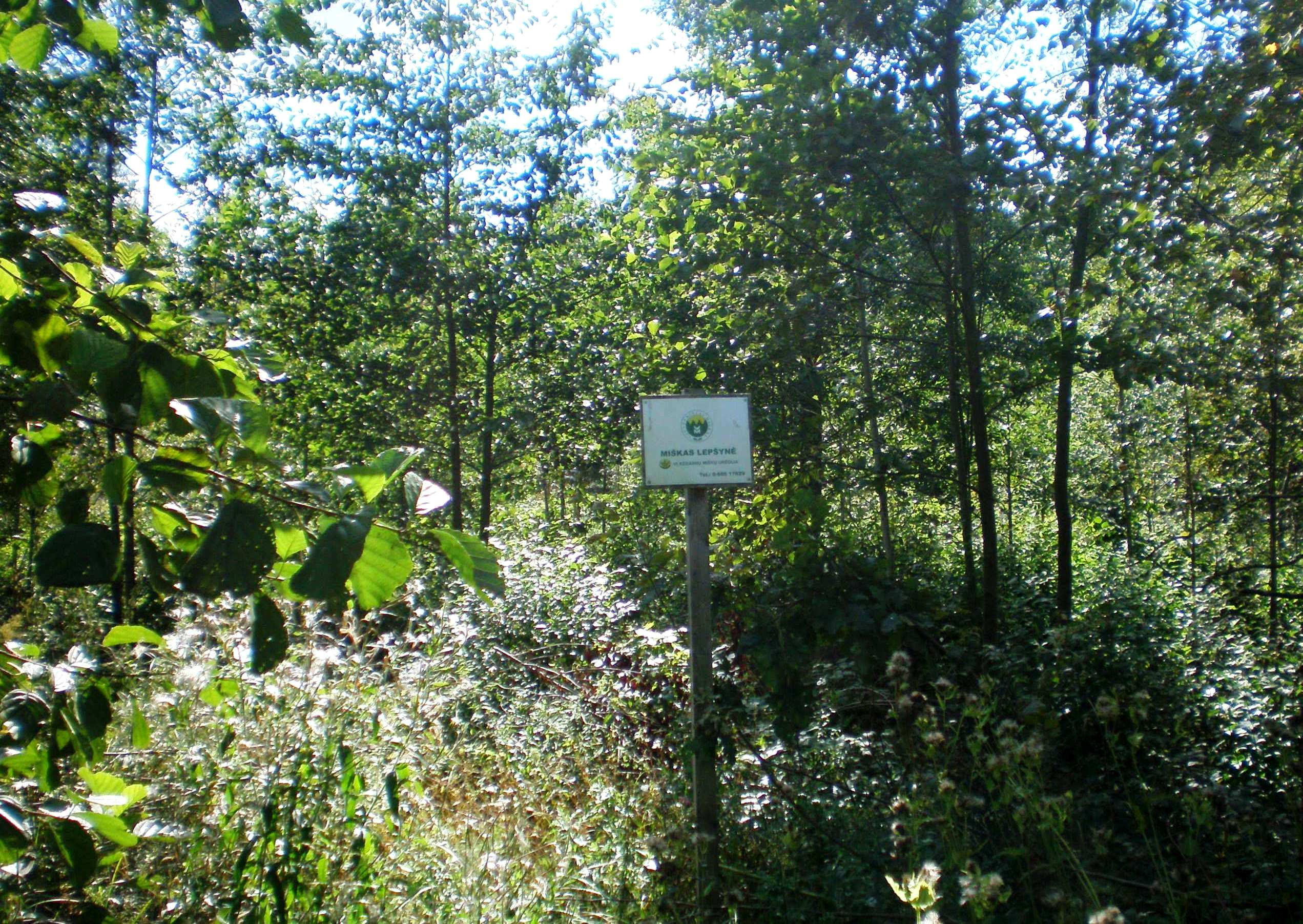 Lepšynės miškas, Lančiūnavos-Šventybrasčio masyvas, Kėdainių raj.